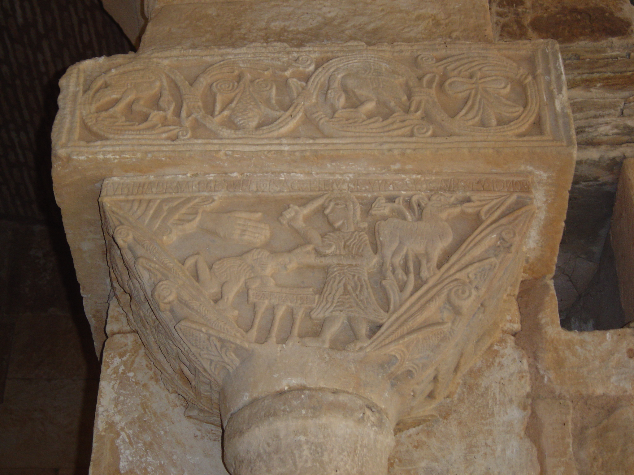 Detalle de un capitel de la iglesia visigoda de San Pedro de la Nave (Zamora, España)